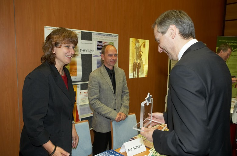 Preisverleihung European Award for Lifelong Learning 2009 in Silber durch den Europäischen Kommissar für allgemeine und berufliche Bildung, Kultur und Jugend Ján Figel΄ am 07.09.2009 an Dagmar Schäffer, Koordinatorin des DaF-Netzwerks bis September 2006, und Rüdiger Riechert, verantwortlich für das Web-Konzept des Projekts und die Weiterführung des Portals seit Oktober 2006.